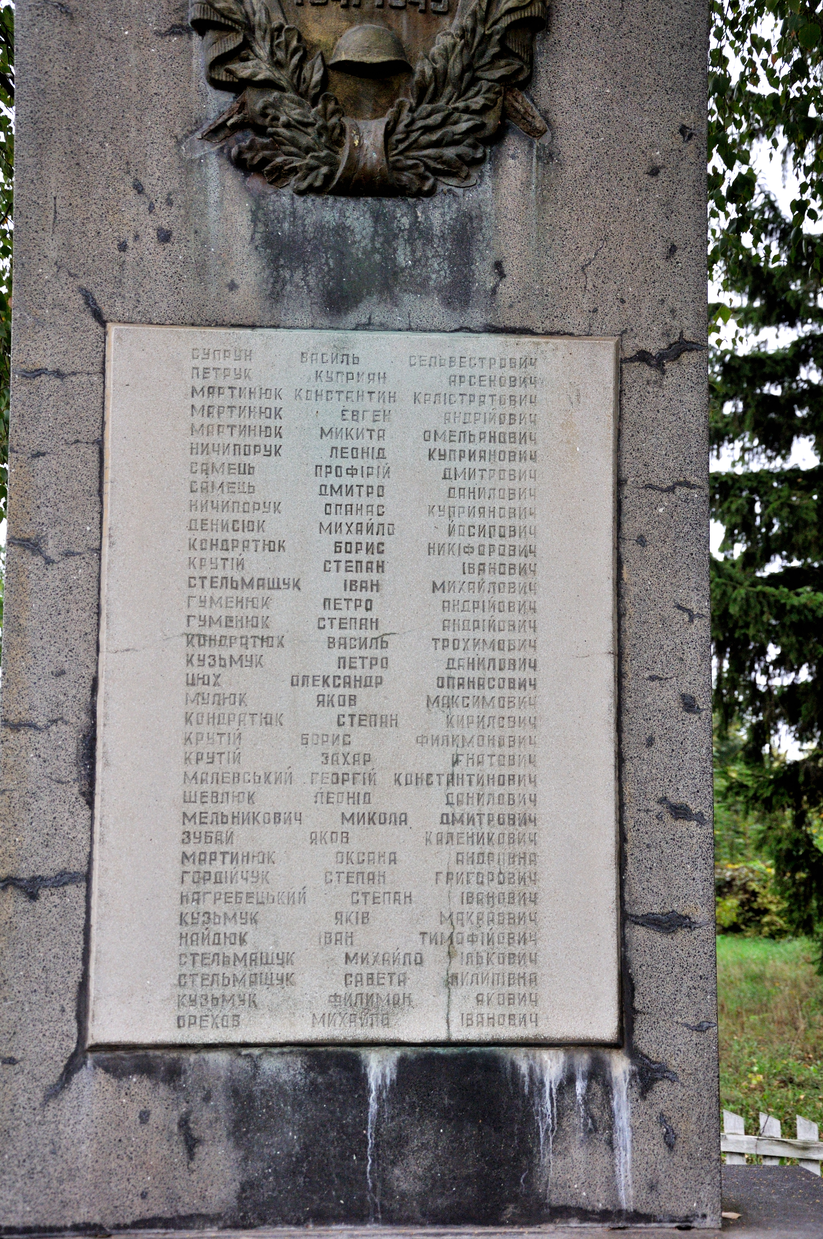 Пам’ятник воїнам- односельчанам і жертвам УБН, с. Країв